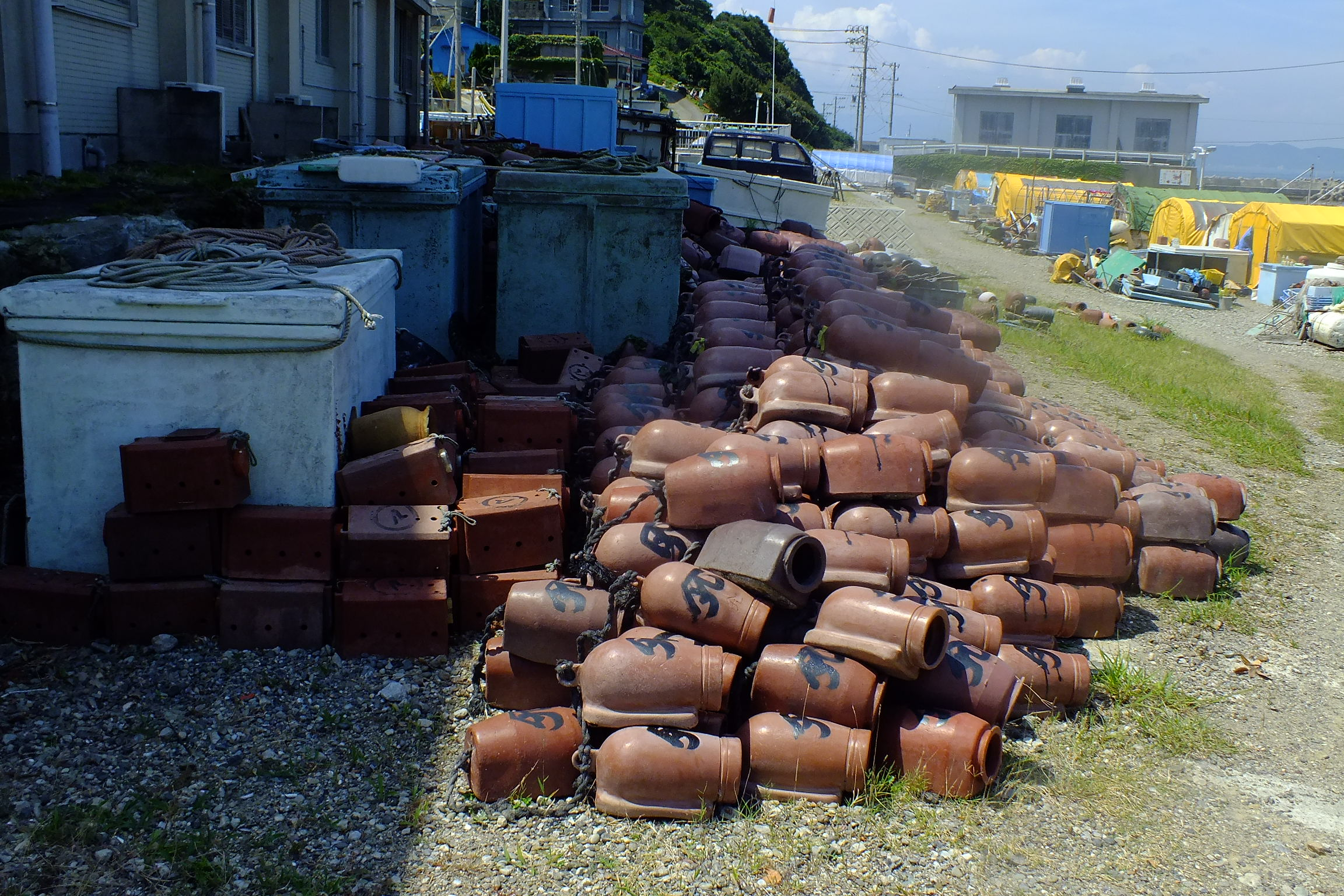 2016-08-05 Kami Island (Mie) 神島漁港前・蛸壺